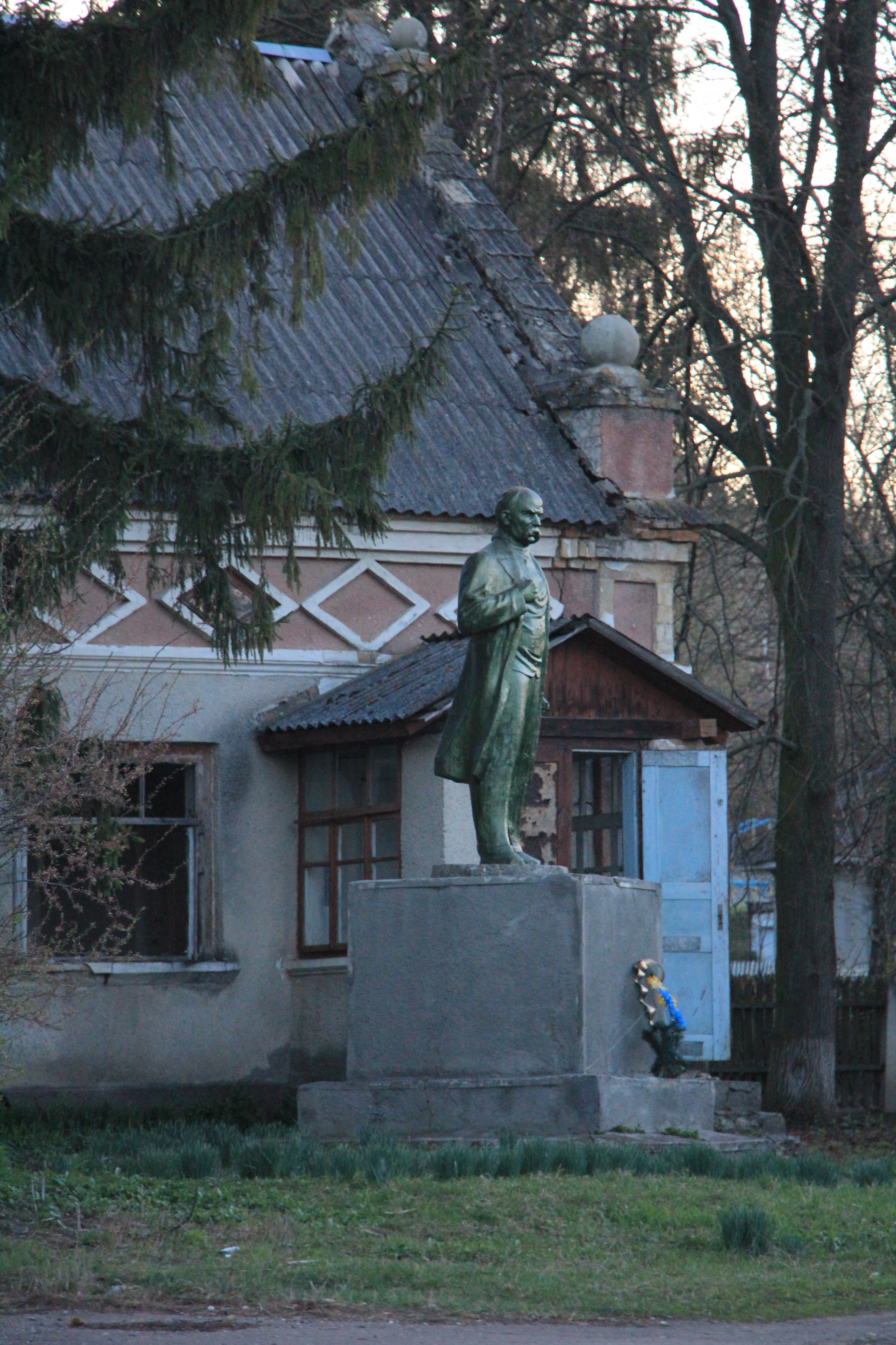 Пам'ятник Т.Г. Шевченку в селі Бриків, Шумьского району, Тернопільської області